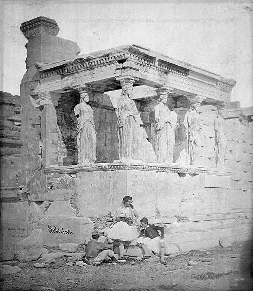 Bearbeitung des Bildes Erechtheum Acropolis 1853.jpg: Histogrammbegrenzung mit g_min = 120 und g_max = 226, anschließend Histogrammspreizung.